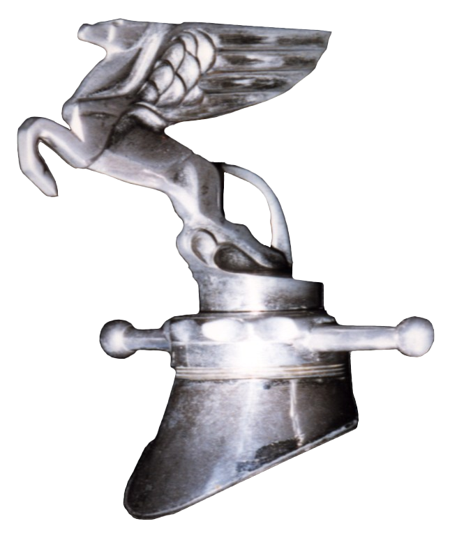 Quelle: Harald H. Linz Fotograf: Harald H. Linz Mit ausdrücklicher Genehmigung von Harald. H. Linz für Wiki eingestellt.